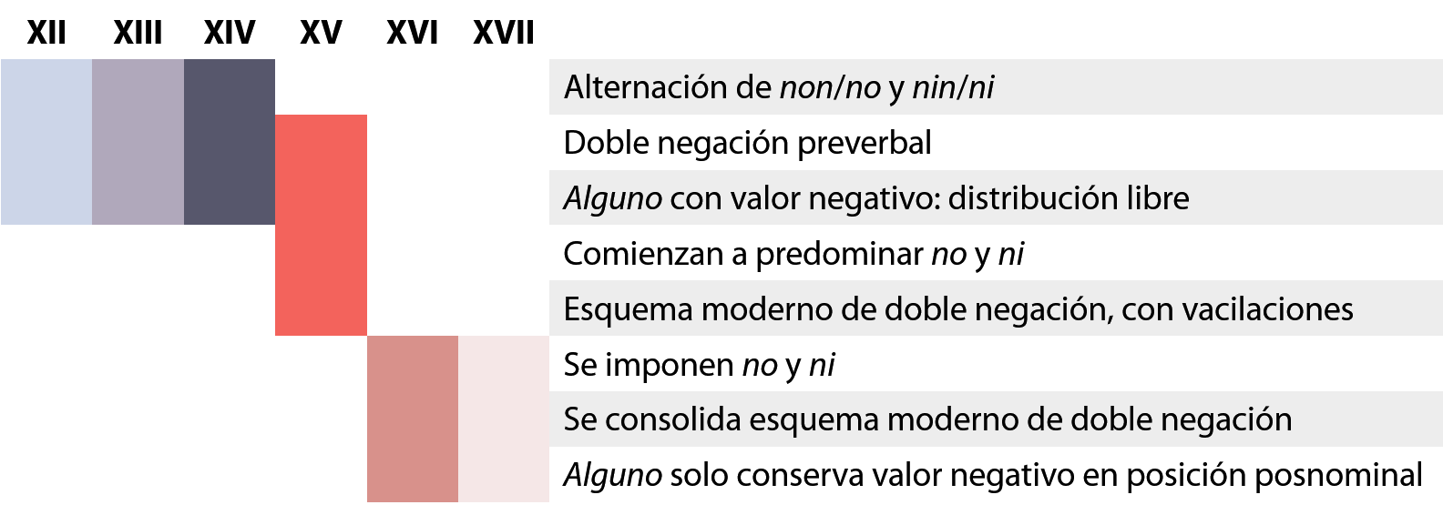 Cuadro cronológico de la negación en el idioma español.